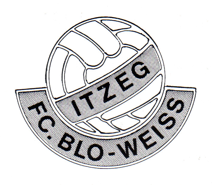 Brun